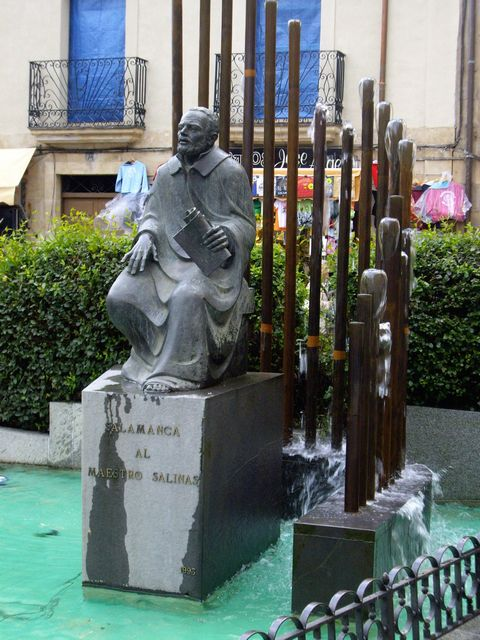 Monumento a Francisco de Salinas, obra de Hipólito Pérez Calvo. Salamanca